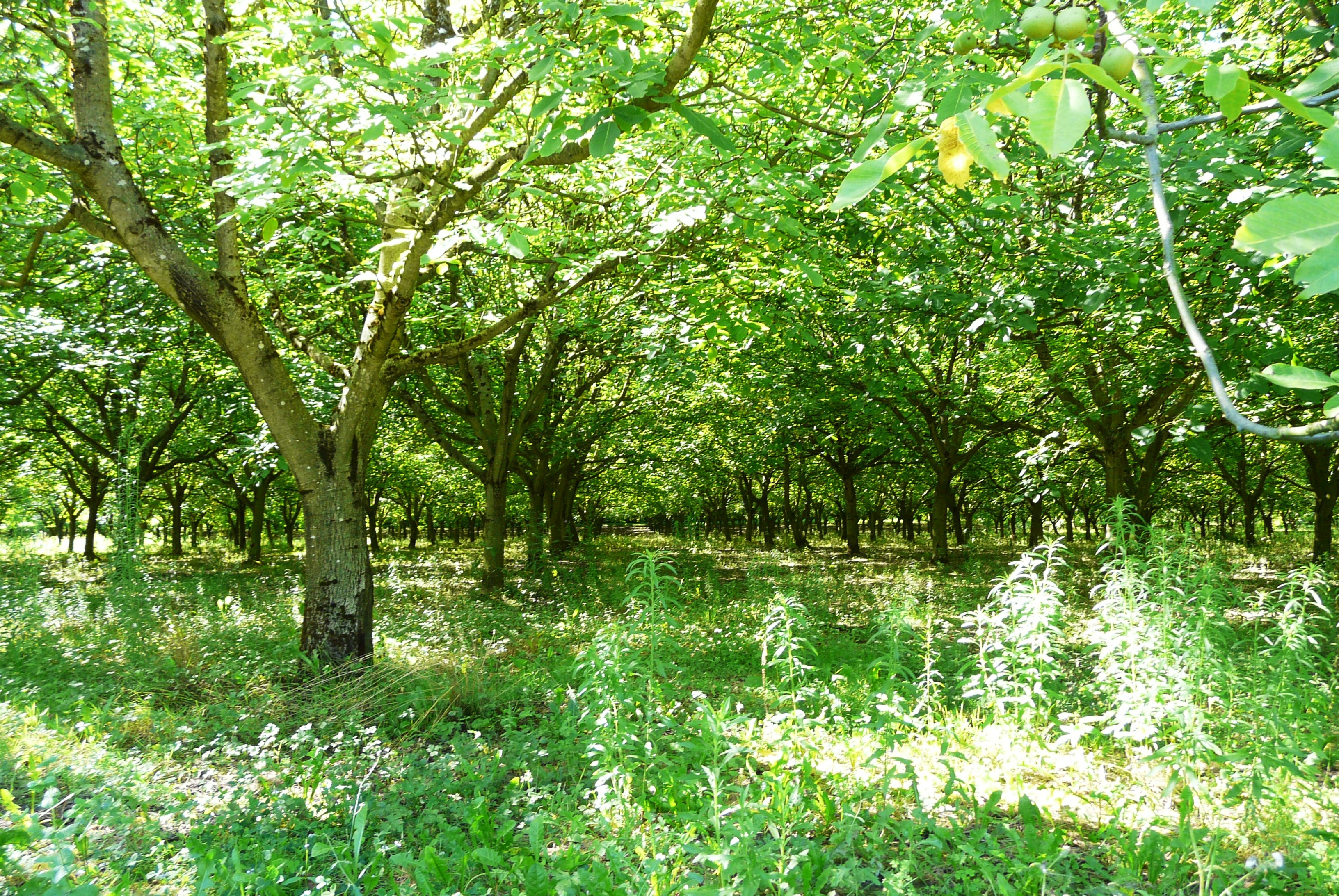 Une noyeraie de noyers communs (Juglans regia) en Dordogne, France